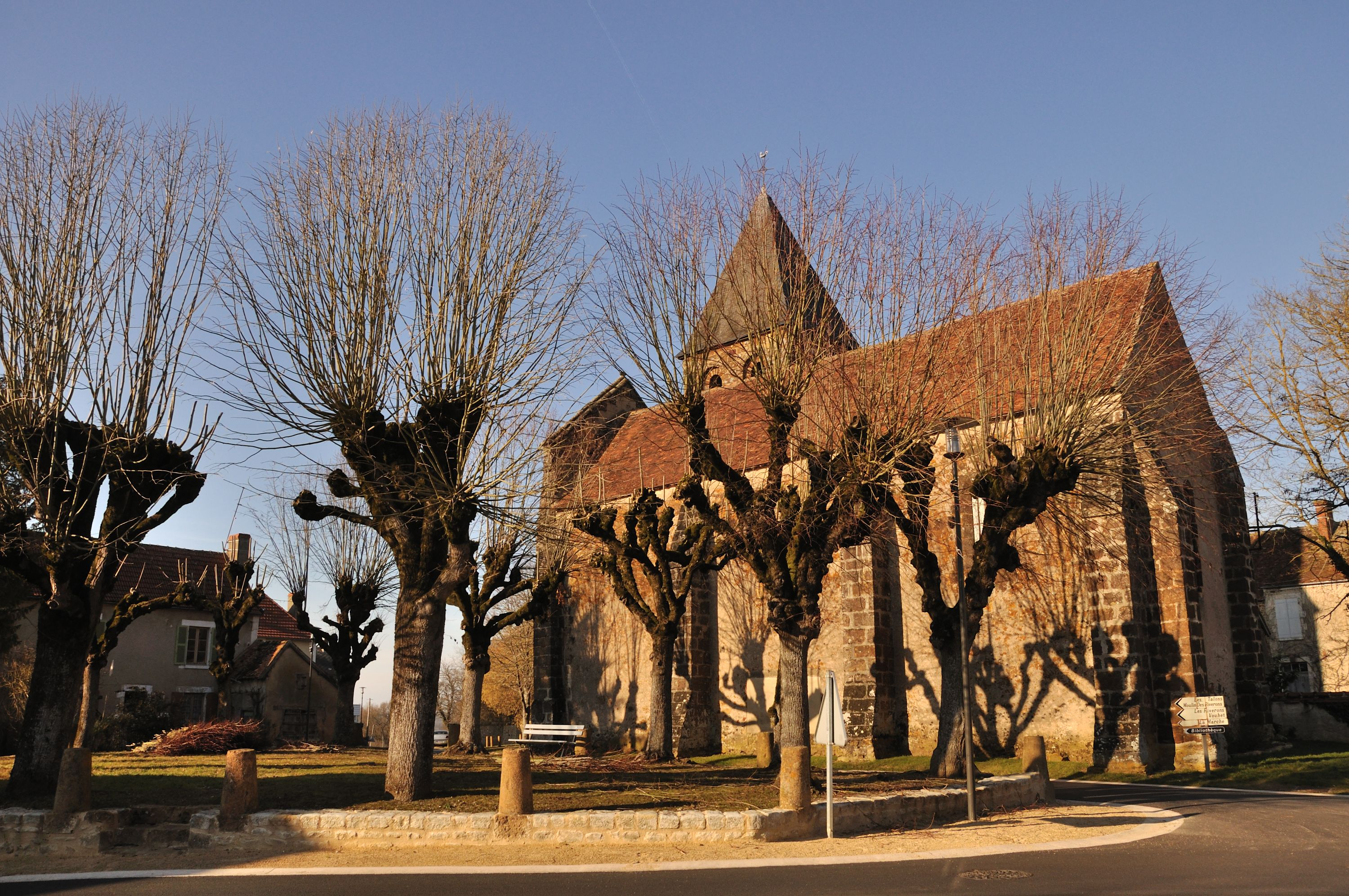 Dunet (Indre) - Place de l'église